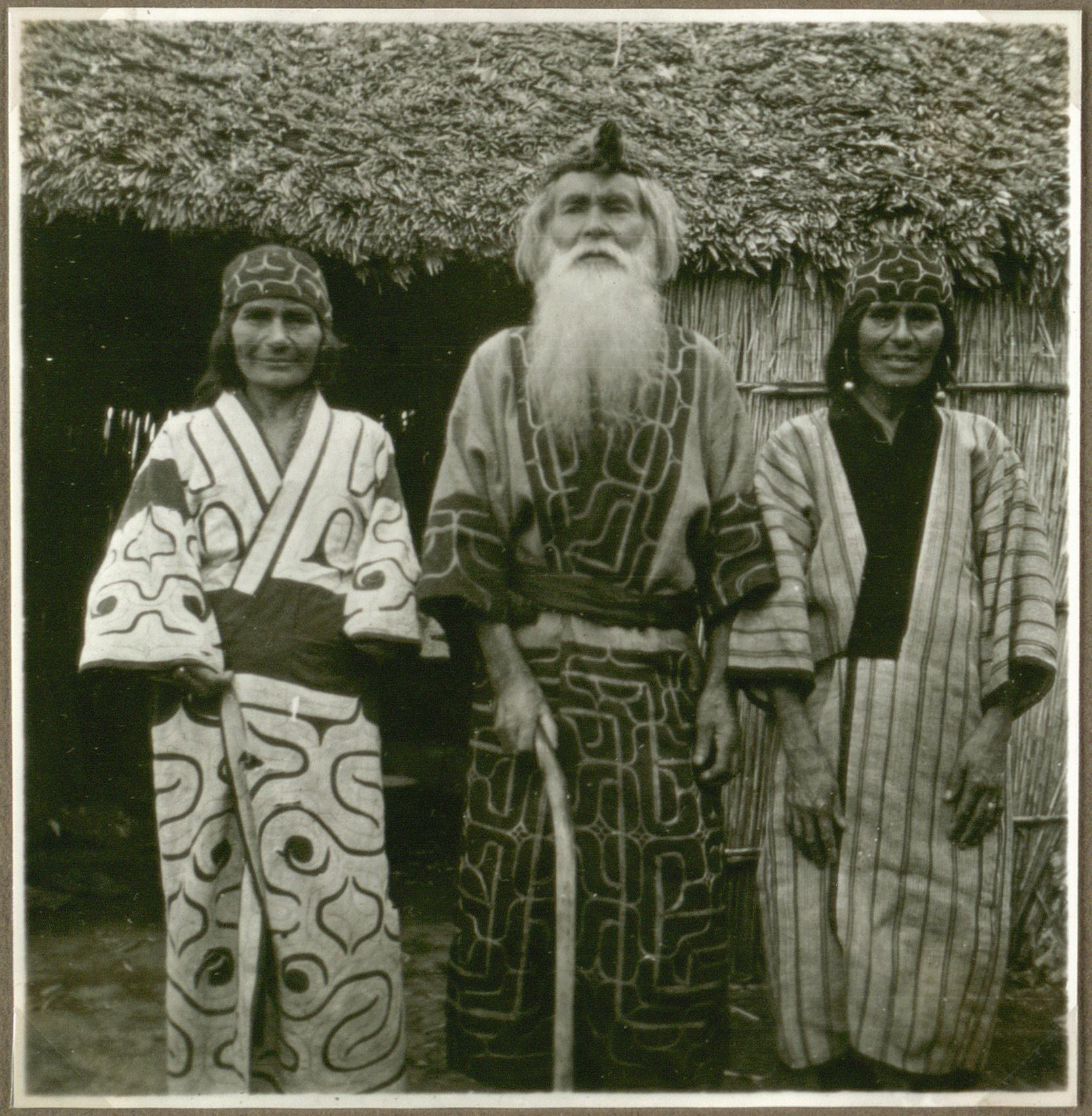 Photographer: Aage Henriksen. No. es_b_00527